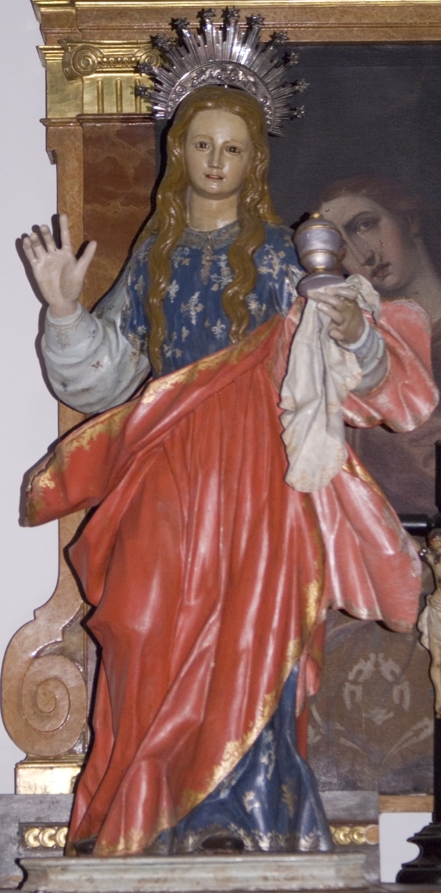 Figura de Santa María Magdalena de la iglesia de Santa María Magdalena de Matapozuelos, Valladolid, España.